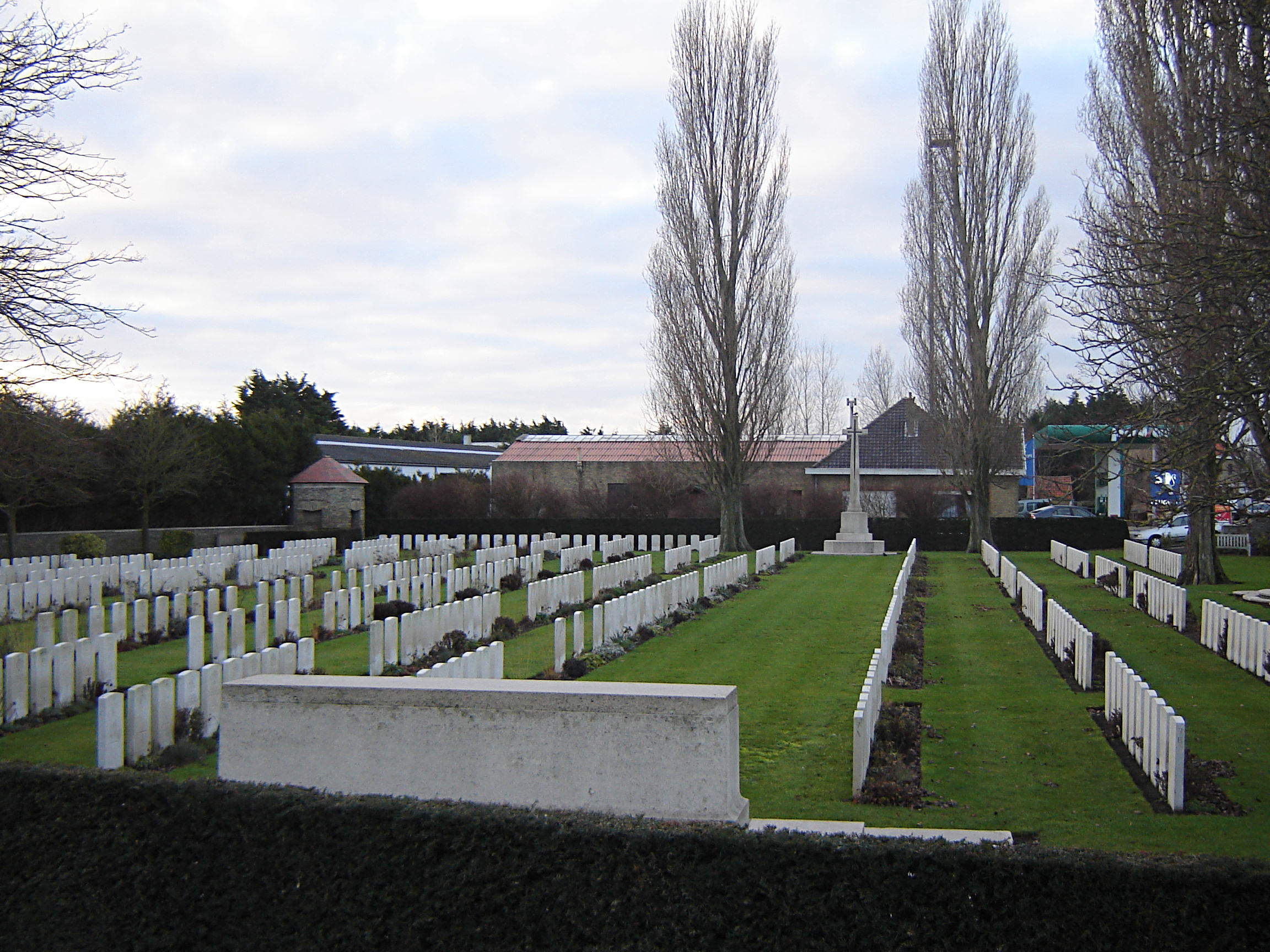 Ramscappelle Road Military Cemetery in Sint-Joris Ramscappelle Road Military Cemetery in Sint-Joris. Sint-Joris, Nieuwpoort, West Flanders, Belgium